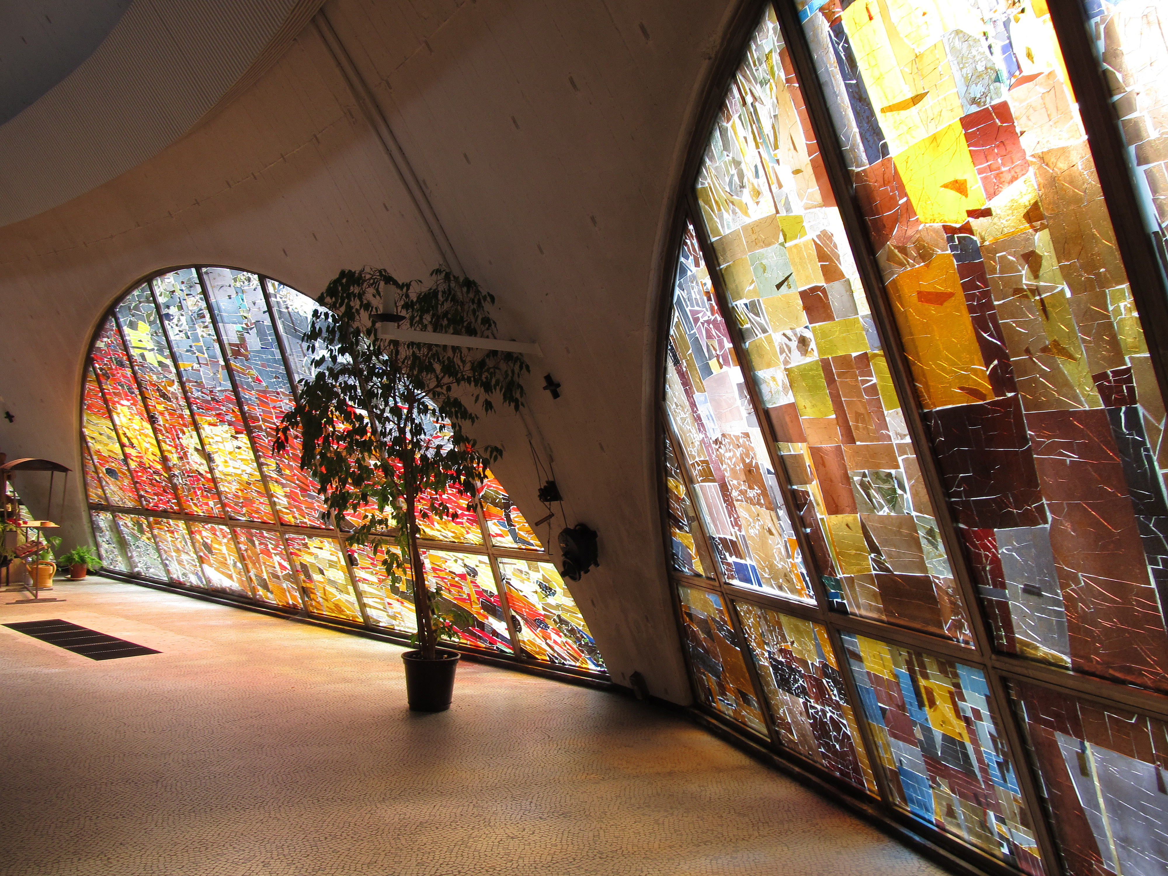 Betonglasfenster der katholischen Pfarrkirche St. Fronleichnam in Homburg, Saarland